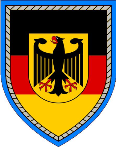 coat of arms Logistikkommando der Bundeswehr (LogKdoBw Bw) of the Bundeswehr (Armed Forces of the Federal Republic of Germany). → Remarks on naming and categorization scheme Date December 2013Source BundeswehrAuthor Bundeswehr This vector image includes elements that have been taken or adapted from this file: BMVg.svg (by Jwnabd). This vector image includes elements that have been taken or adapted from this file: LogKdoBw.png (by Bundeswehr). *ZDv 37/10 2013 coat of arms Logistikkommando der Bundeswehr (LogKdoBw Bw) of the Bundeswehr (Armed Forces of the Federal Republic of Germany). → Remarks on naming and categorization scheme